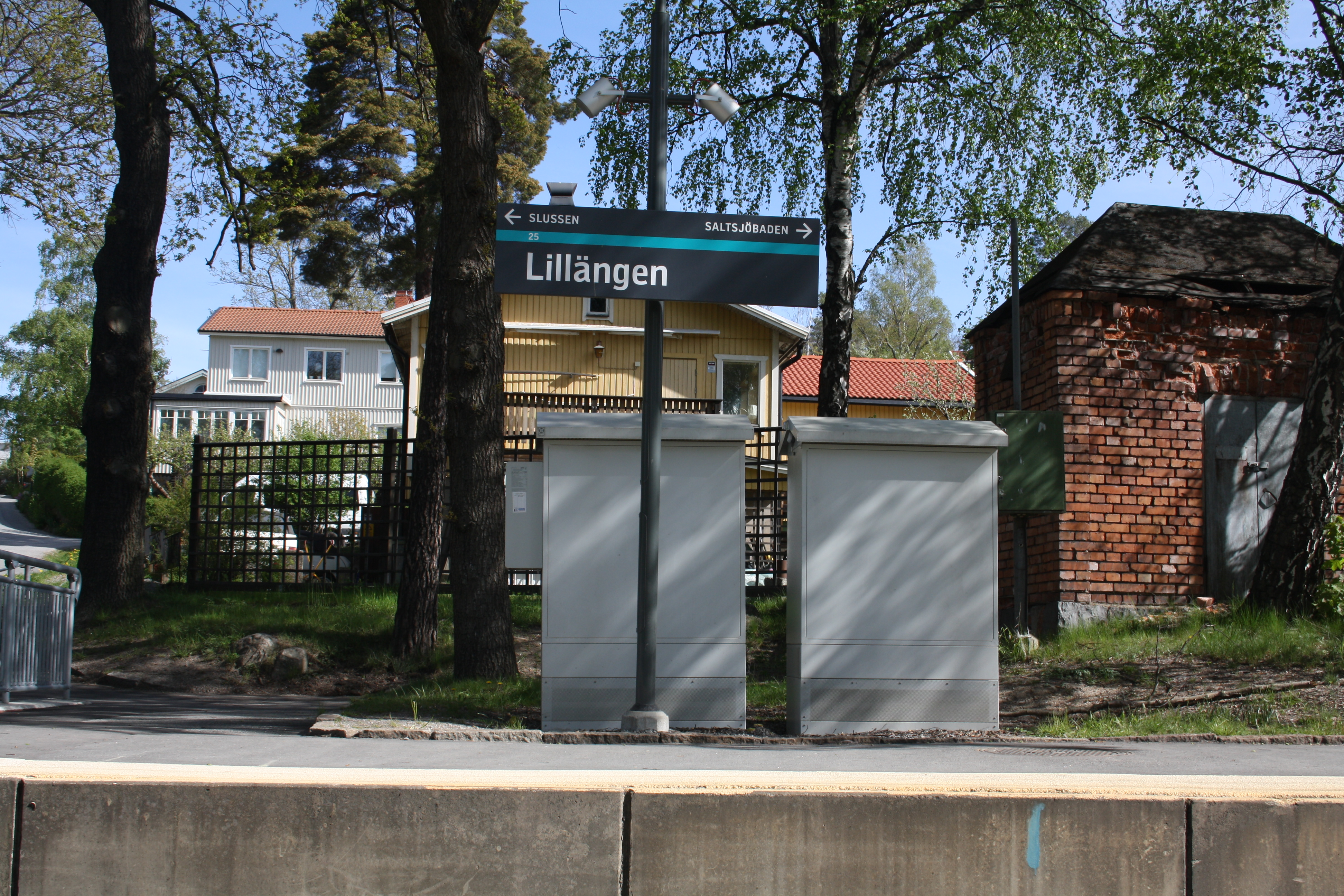 Lillängen